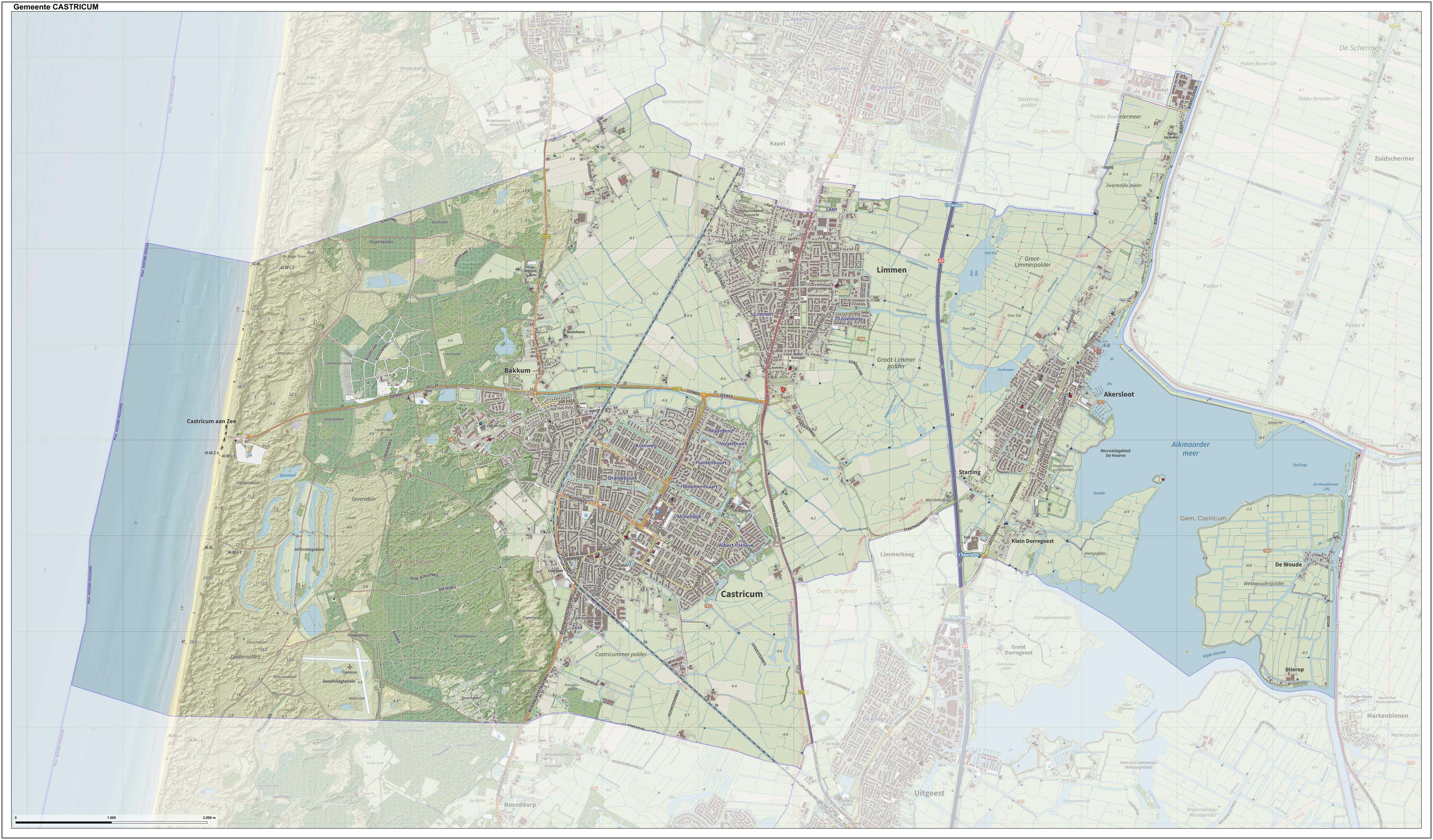 Topografische gemeentekaart. Resolutie: 400 pixels/km. Kaartbeeld samengesteld uit de open geodata van de Top10NL en Top25namen (Kadaster), Creative Commons-BY licentie. Gebouwvlakken uit open geodata BAG extract. Wegen uit de OpenStreetMap, OpenStreetMap community. Reliëfschaduw uit de Actuele Hoogtekaart AHN2. Samenstelling en kleurenschema: Jan-Willem van Aalst, met QGIS. Zie ook de Legenda.